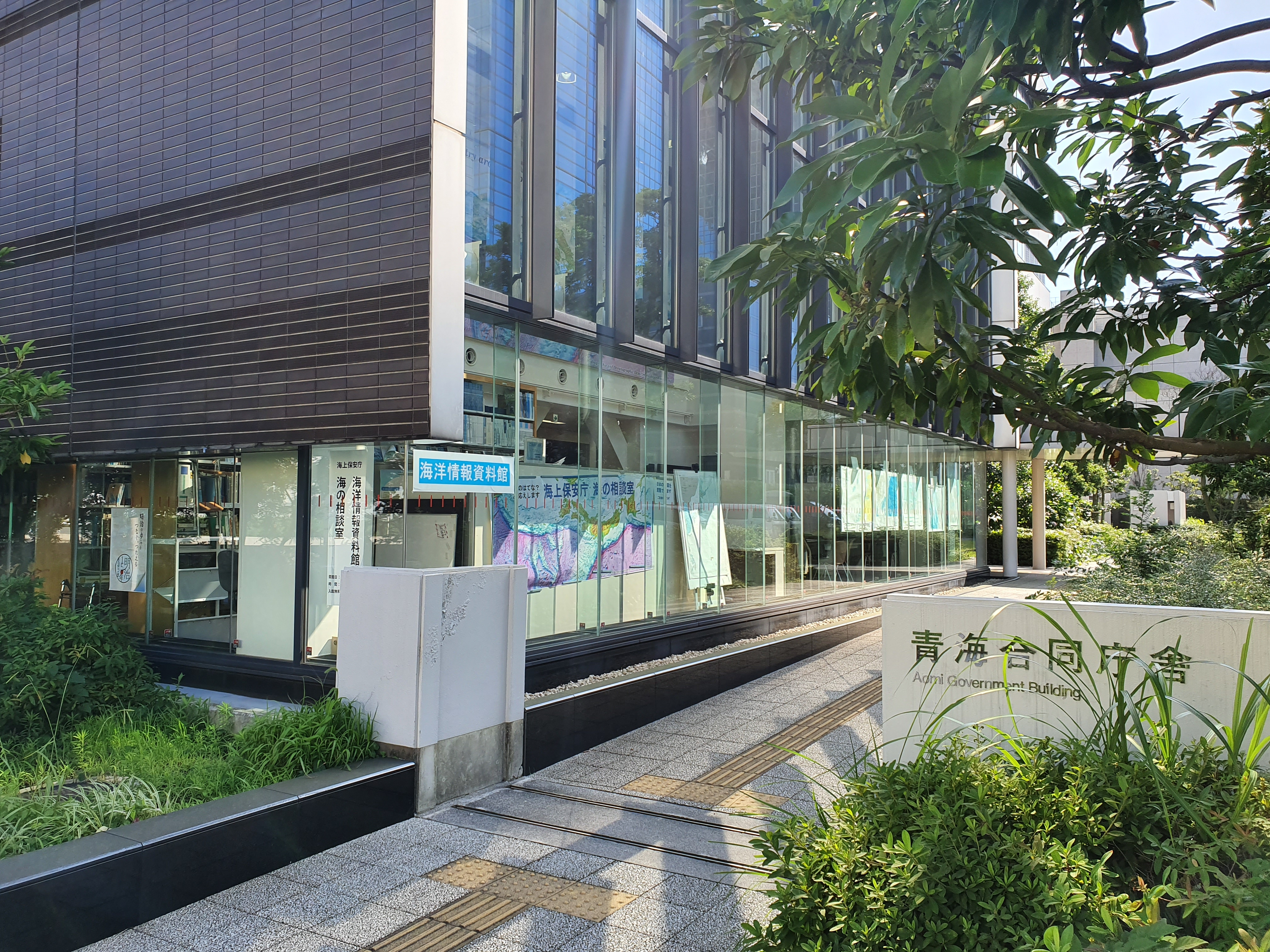 海洋情報資料館、海上保安庁海の相談室、青海合同庁舎